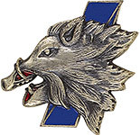 Pucelle de la première escadrille de l'Escadron de Chasse 3/3 "Ardennes"